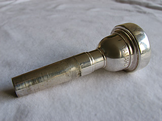 Zelfgemaakte foto van eigen instrument